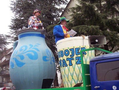 Die Symbolfiguren der "Isebojer Fassenacht" Der Watz im Gerippte und der Oberlump im Bembel